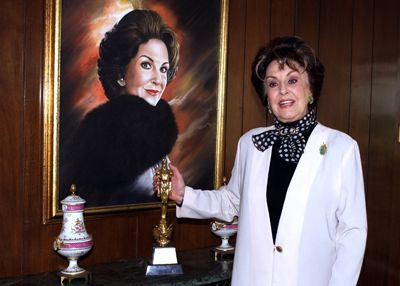 La famosa actríz de cine mexicano Marga López, junto a su premio Ariel de Oro de mejor actriz.